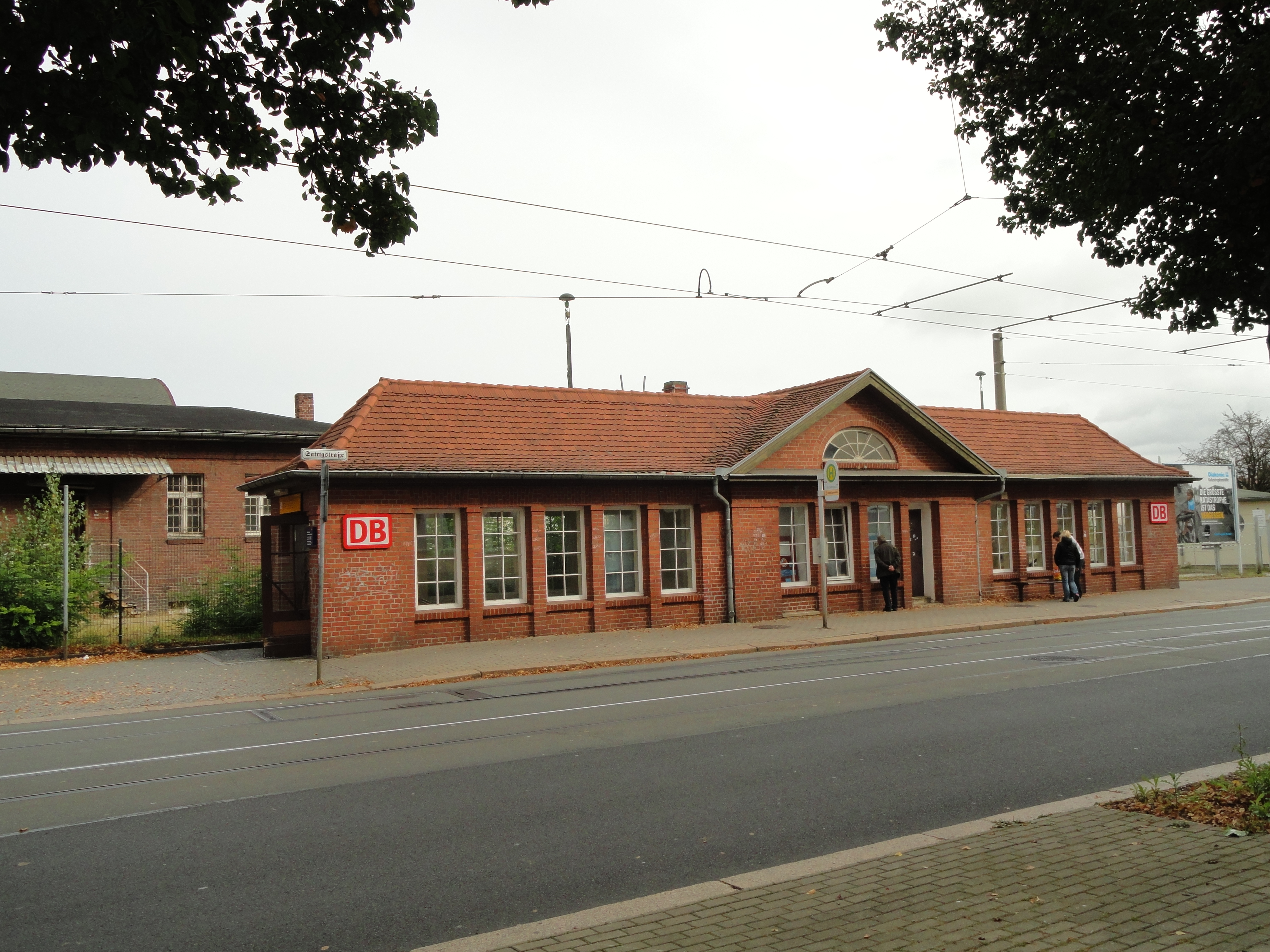 Südausgang des Bahnhofs Görlitz an der Sattigstraße